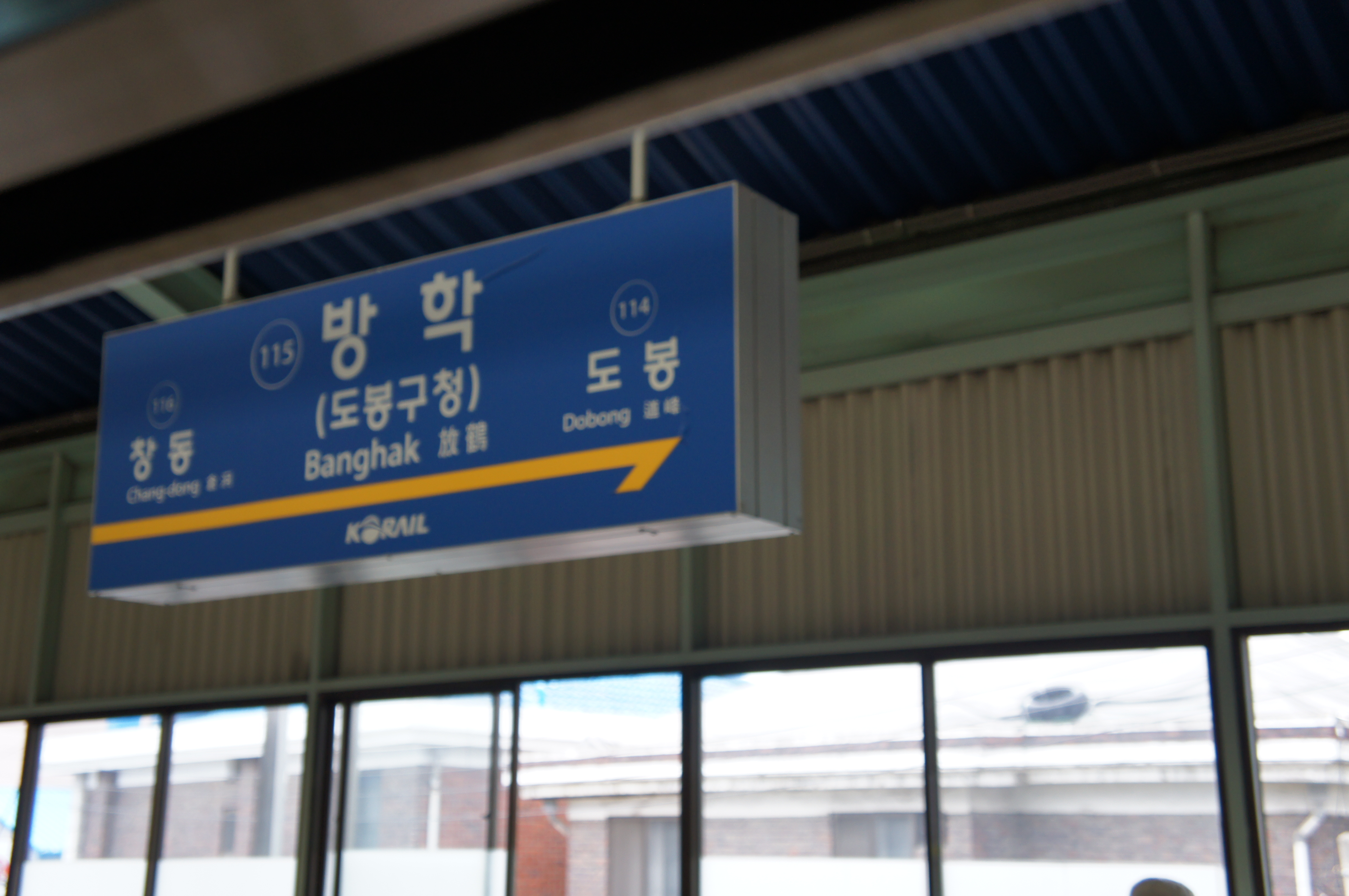 방학역 역명판